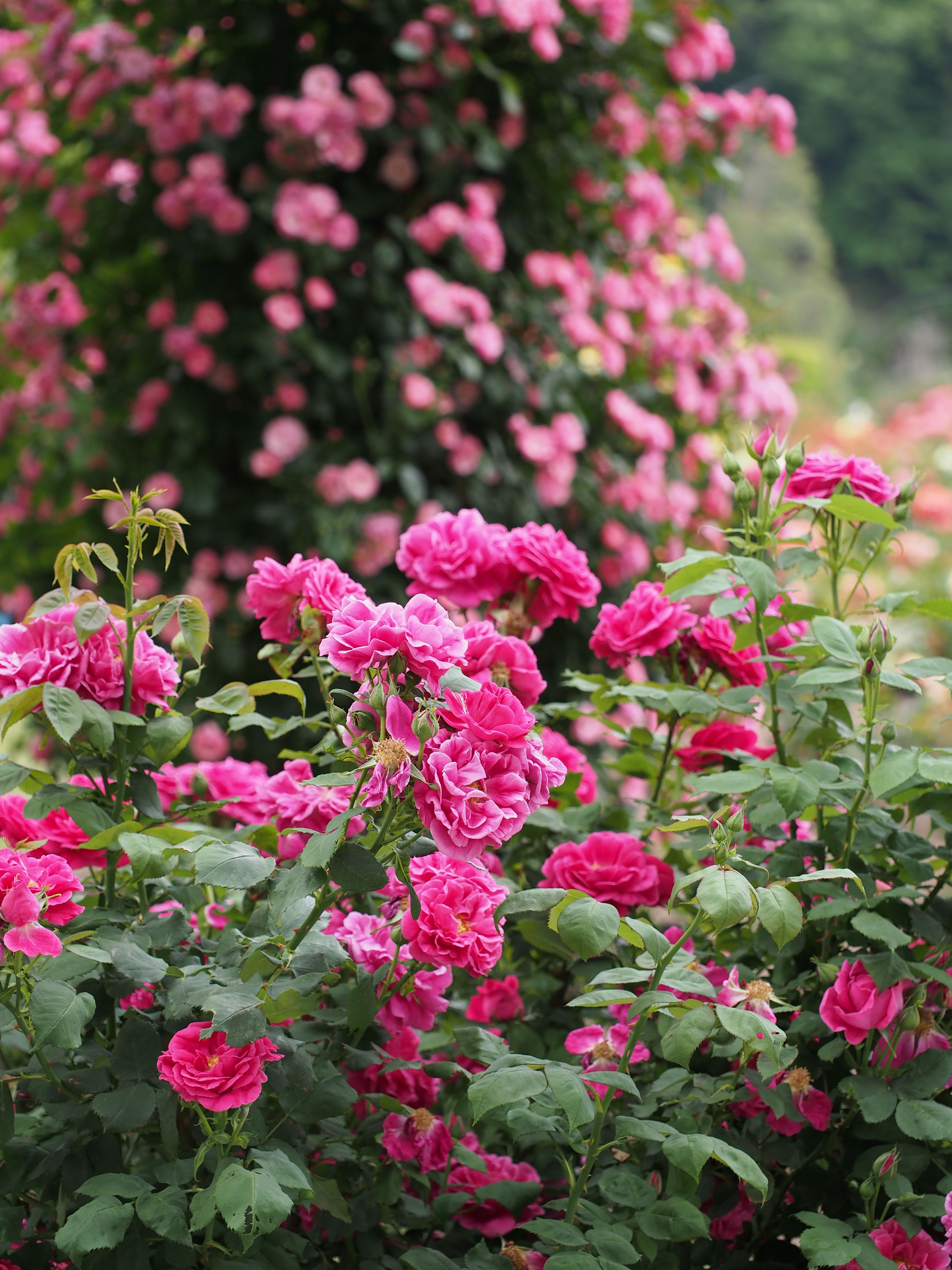 Rose, Ferdinand de Lesseps, バラ, フェルディナン ドゥ レセプ, Old rose(HP) オールドローズ France フランス Verdier 1869